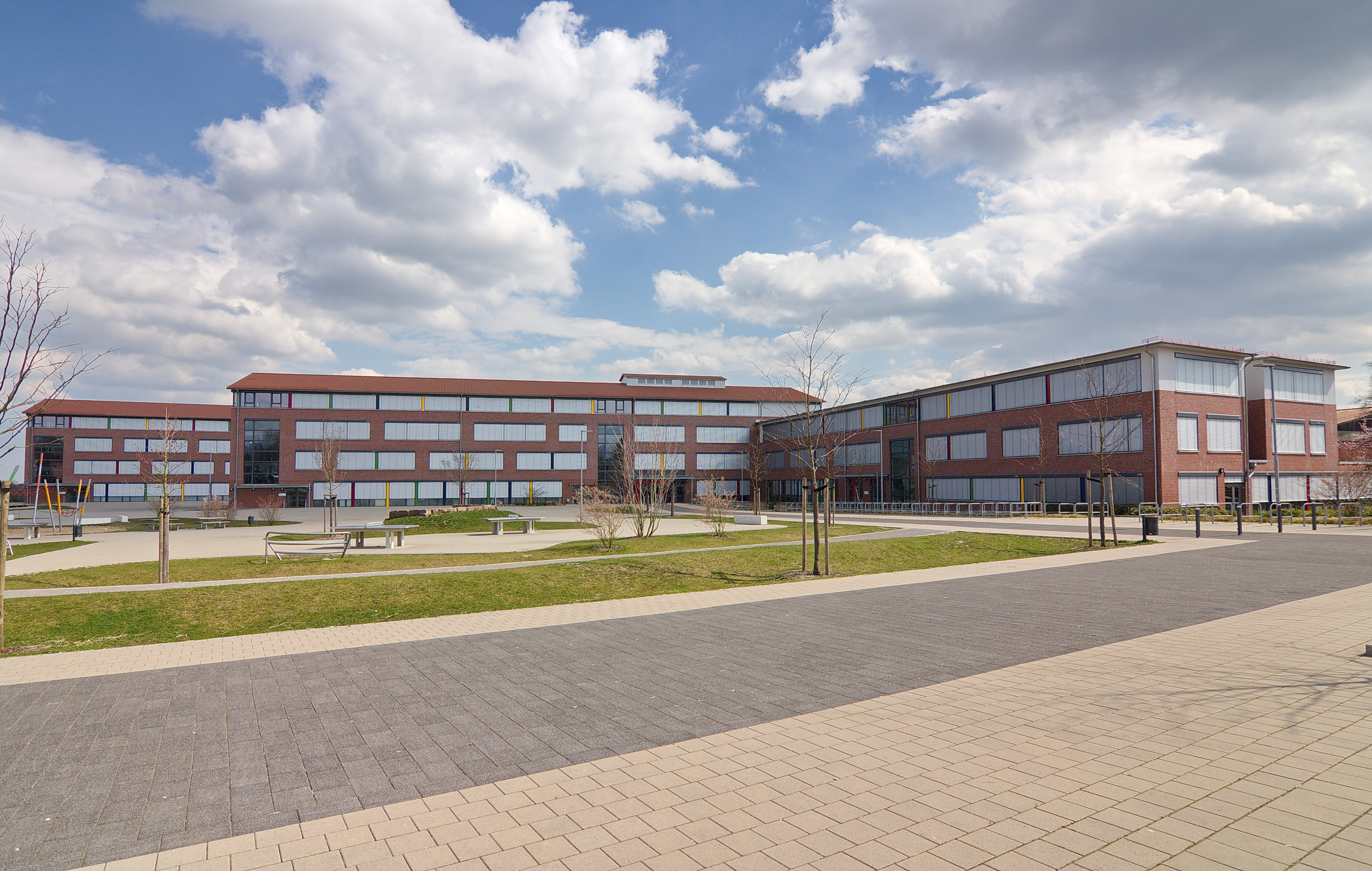 Mellendorf (Wedemark), Niedersachsen, Deutschland